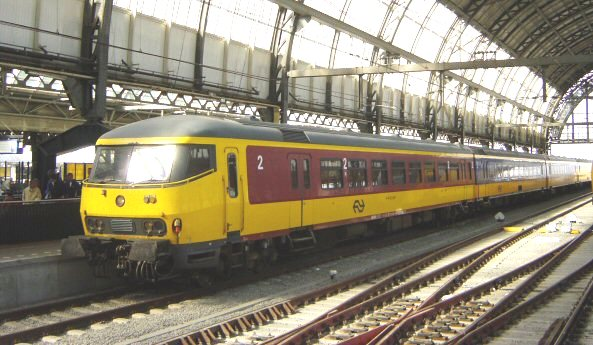 Beneluxtrein te Amsterdam Centraal. Eigen foto, september 2004